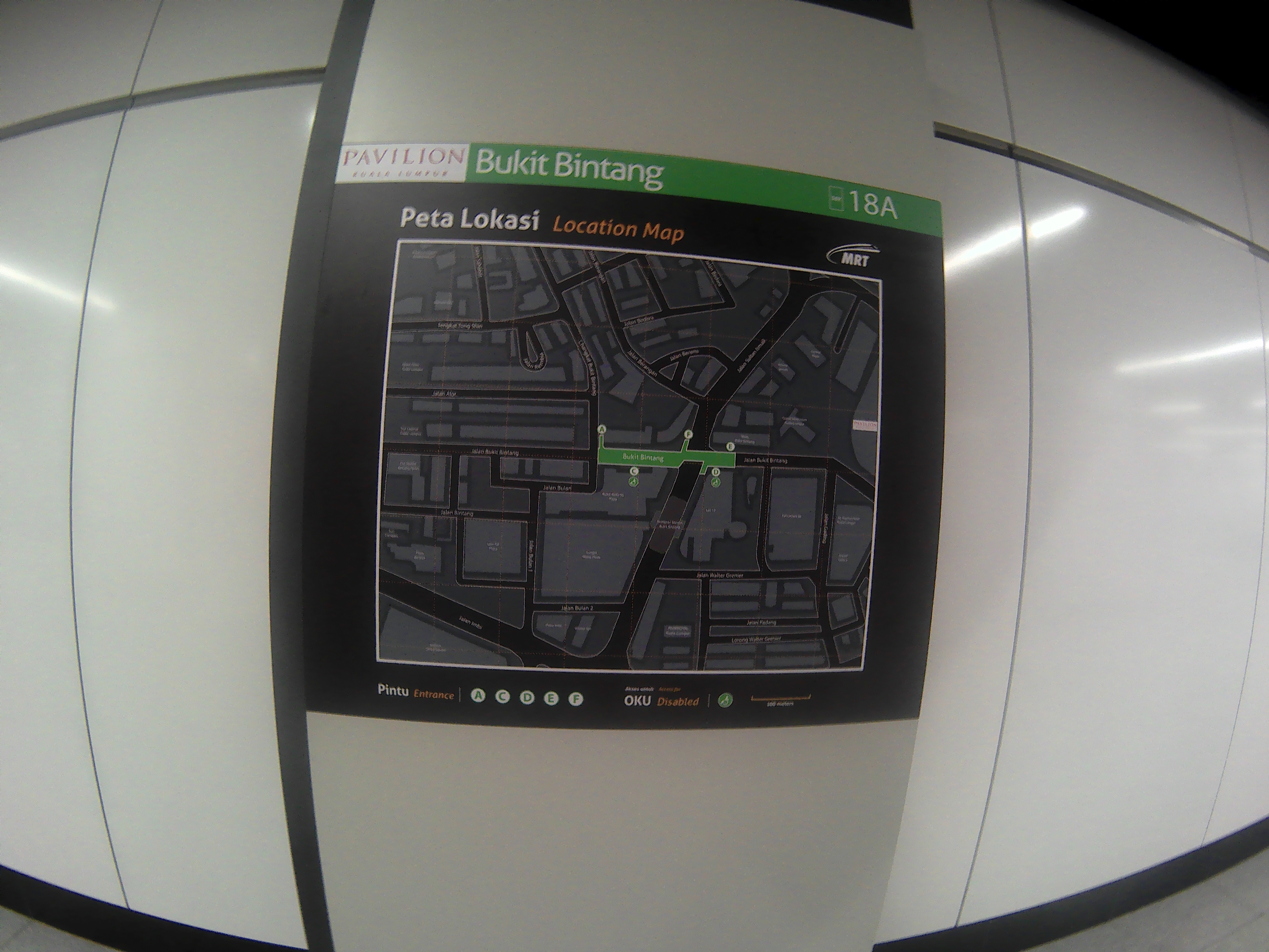 Bukit Bintang MRT Station map